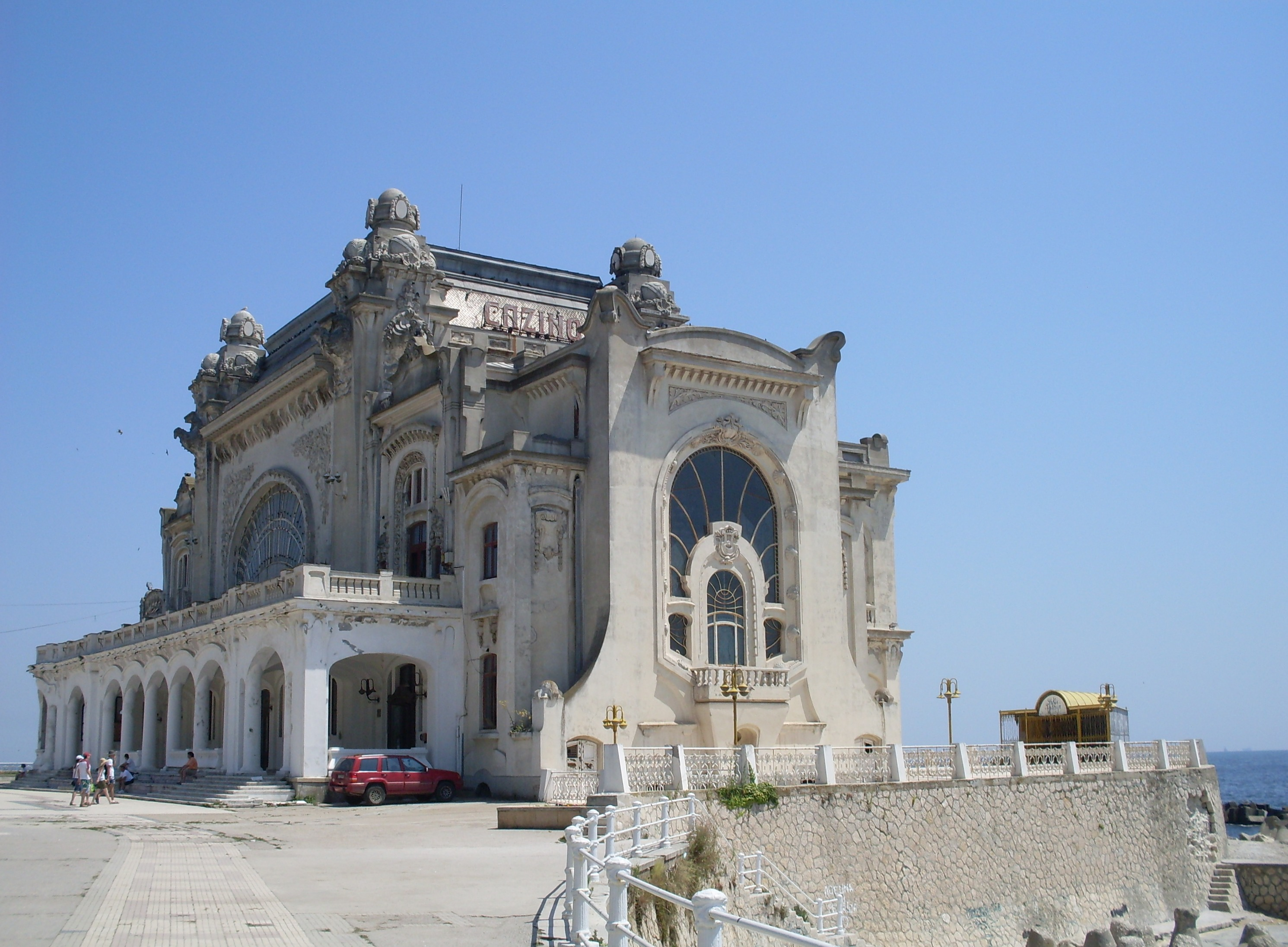 CazinouConstanta